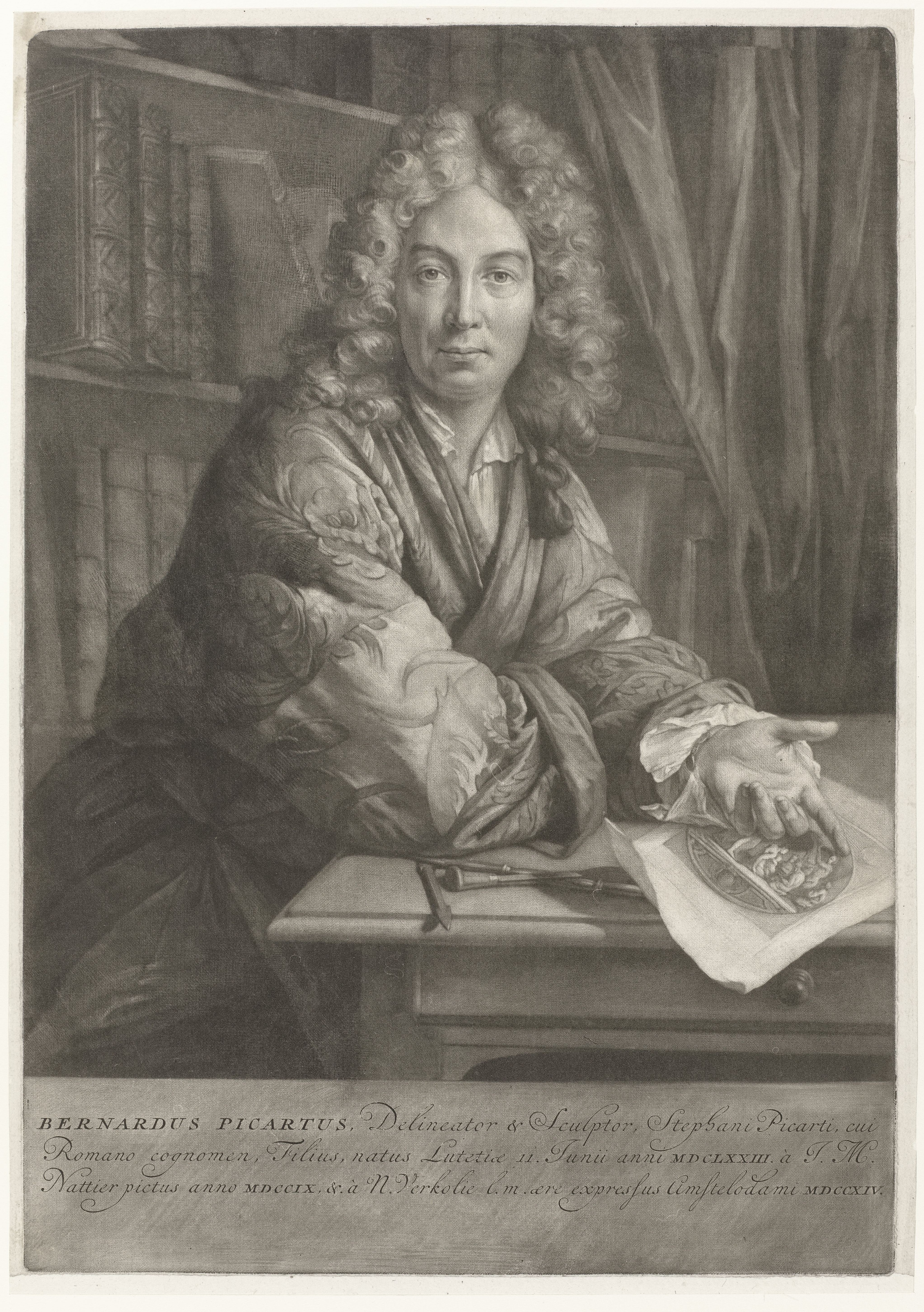 IdentificatieTitel(s): Portret van Bernard PicartObjecttype: prent Objectnummer: RP-P-1911-185Catalogusreferentie: Nagler Künstlerlexikon 7Wurzbach 71(5)Opmerking: staat bepaald aan de hand van aanwezige prenten in RijksprentenkabinetOpschriften / Merken: verzamelaarsmerk, verso, gestempeld: Lugt 2228Omschrijving: De tekenaar en graveur Bernard Picart zit aan een tafel en draagt een geborduurde jas. Hij wijst op zijn prent uit 1709 met daarop de antieke gesneden steen die toen bekend stond als 'Cachet de Michel Ange' maar naar een gegraveerde edelsteen van Pyrgoteles gemaakt is. Naast de prent liggen enkele graveursgereedschappen. Achter hem een groot aantal boeken.VervaardigingVervaardiger: prentmaker: Nicolaas Verkolje (vermeld op object)naar schilderij van: Jean-Marc Nattier (vermeld op object)Plaats vervaardiging: AmsterdamDatering: 1714Fysieke kenmerken: mezzotint en gravure; proefdrukMateriaal: papier Techniek: mezzotint / graveren (drukprocedé)Afmetingen: plaatrand: h 346 mm × b 240 mmOnderwerpWat: tools, implements of printerbookgem, gemstone (+ relief ~ sculpture)print, e.g.: engraving, etching, lithographportrait, self-portrait of artistWie: Bernard PicartVerwerving en rechtenVerwerving: aankoop 1911Copyright: Publiek domein